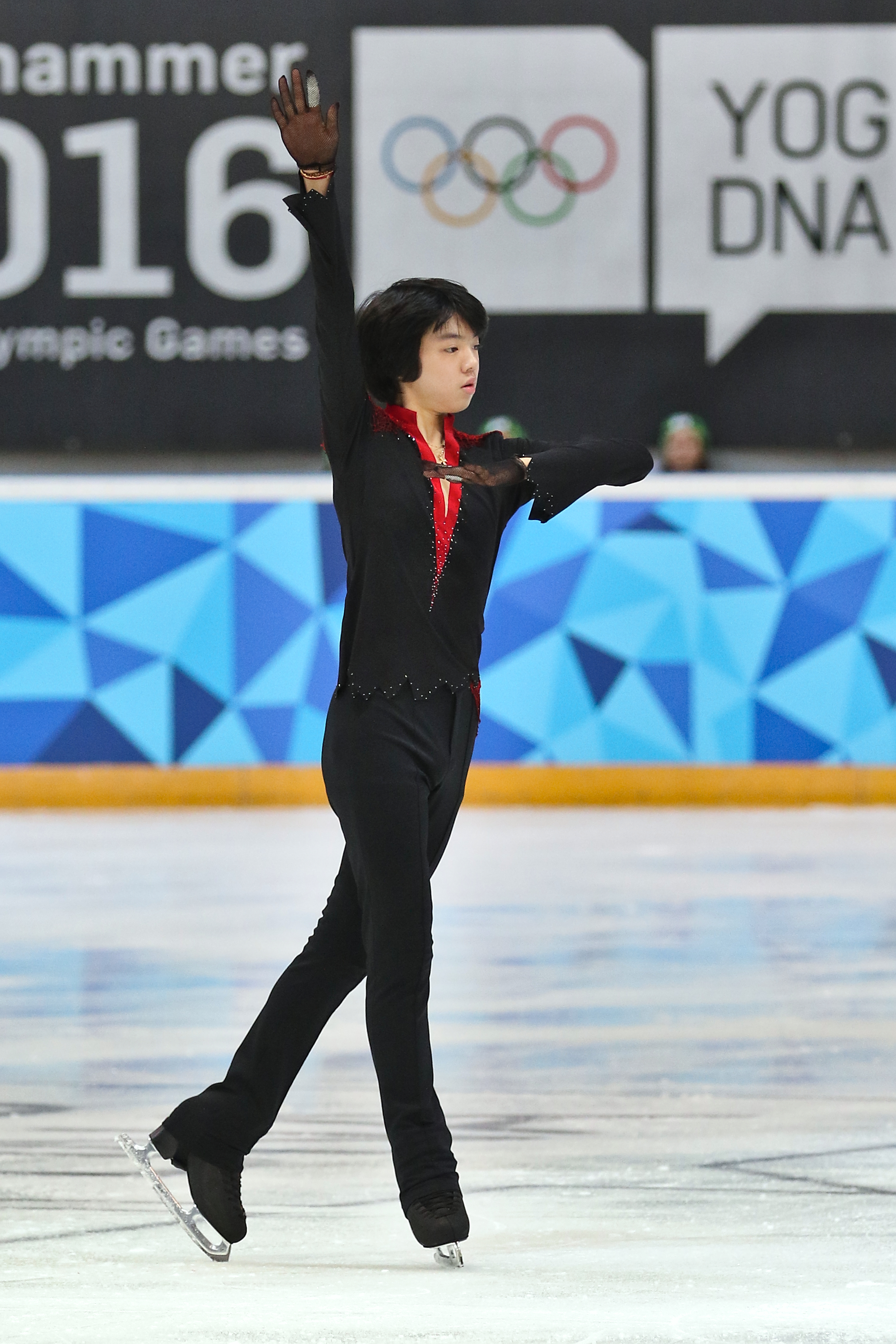 Lillehammer 2016 - Figure Skating Men Short Program - Jun Hwan Cha